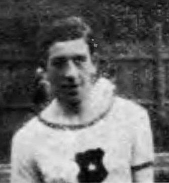 Stanisław Ziffer (Wisła Kraków, 1924)